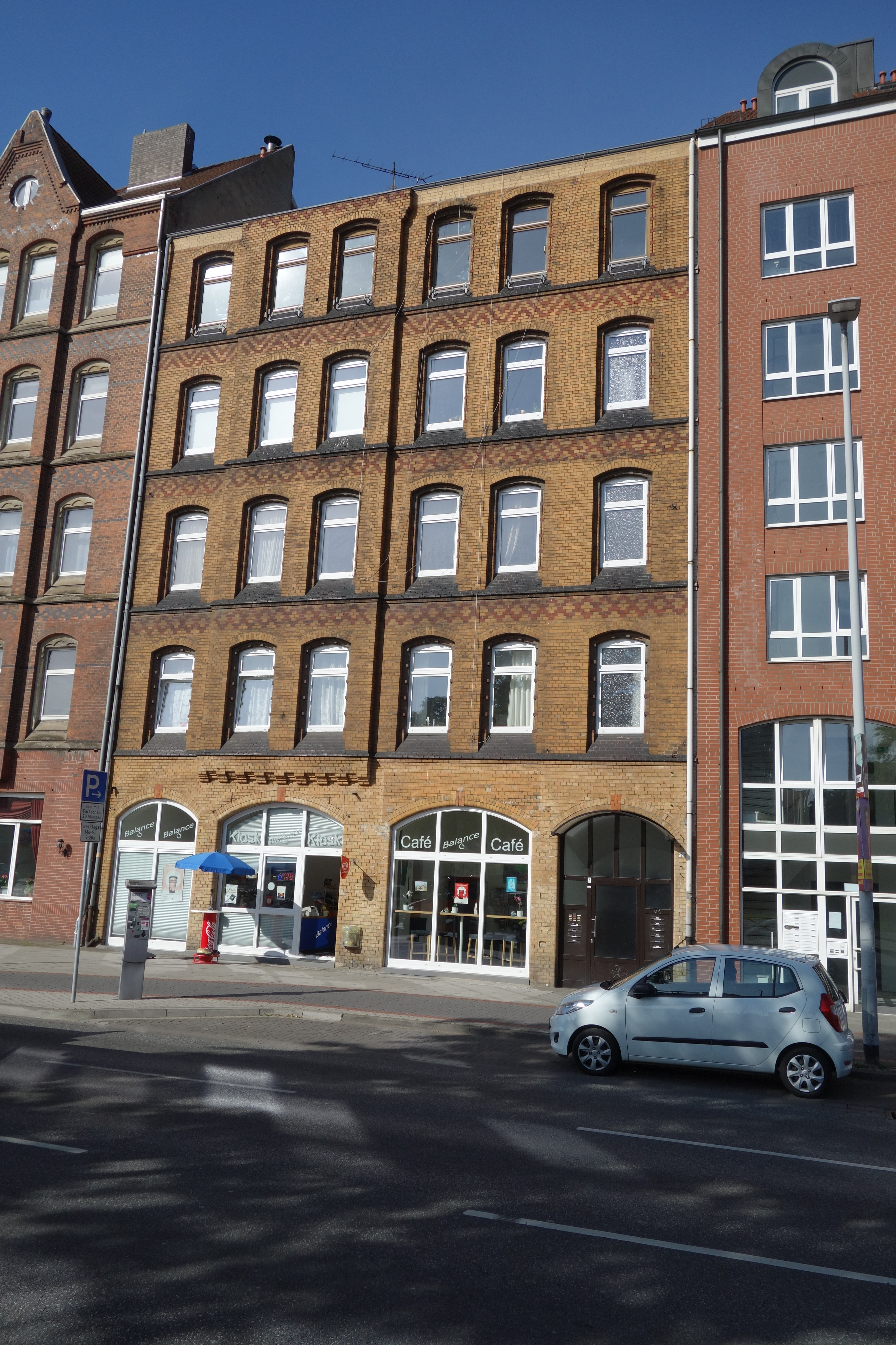 Ein Geschäftshaus am Rande des Zentrums von Hannover, ehemals Sitz des „Niedersächsischen Kohlensyndikats GmbH“. Dies war ein Vertriebskartell für die niedersächsische Steinkohle.